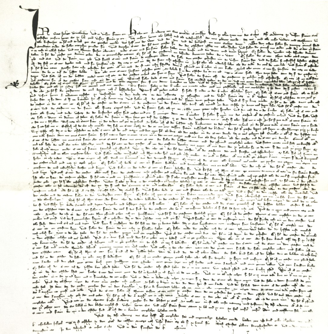 Die Ettaler Regel, Klosterregel des Kloster Ettals. Bayerisches Hauptstaatsarchiv München.